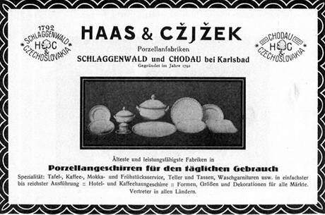 Haas-Cžjžek dobová propagační tiskovina